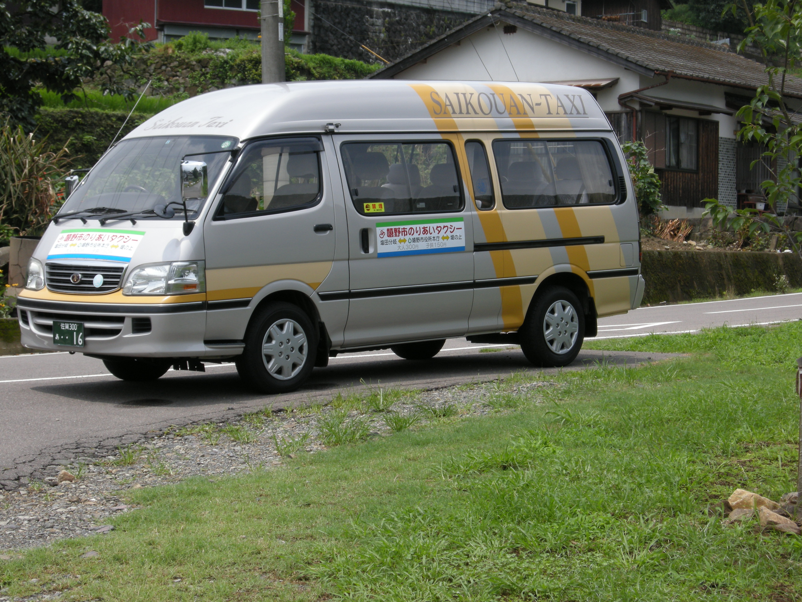 再耕庵タクシー 嬉野市のりあいタクシーの車両